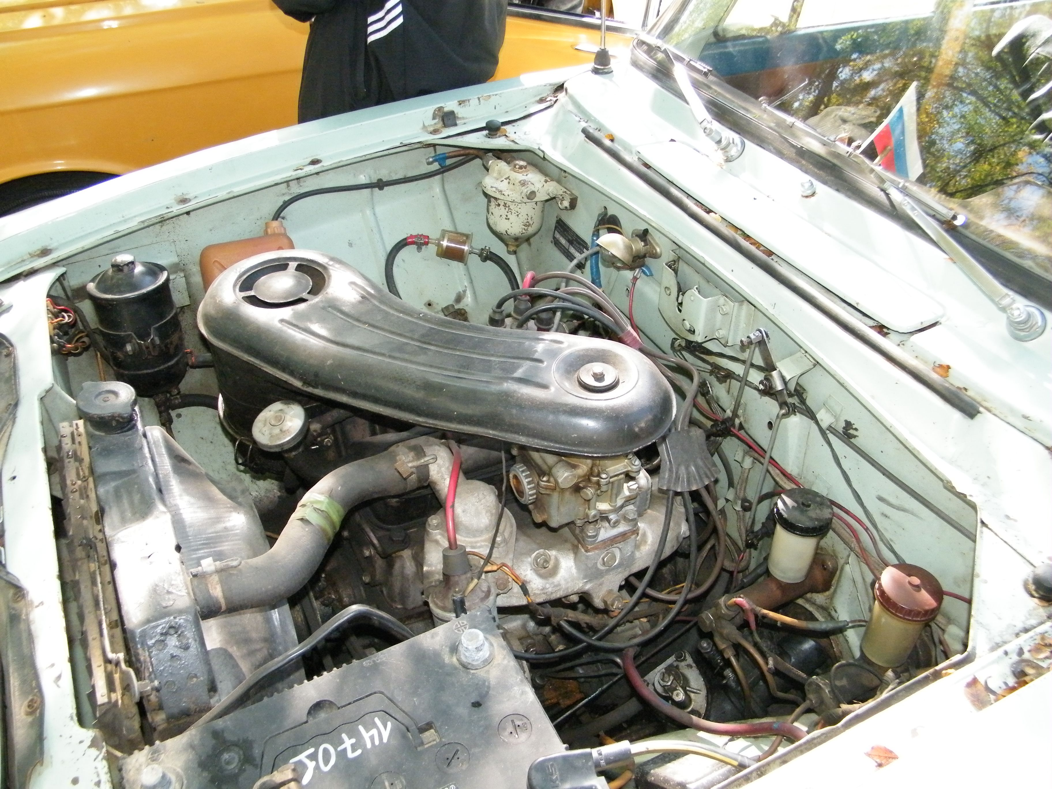 Moskvich 408